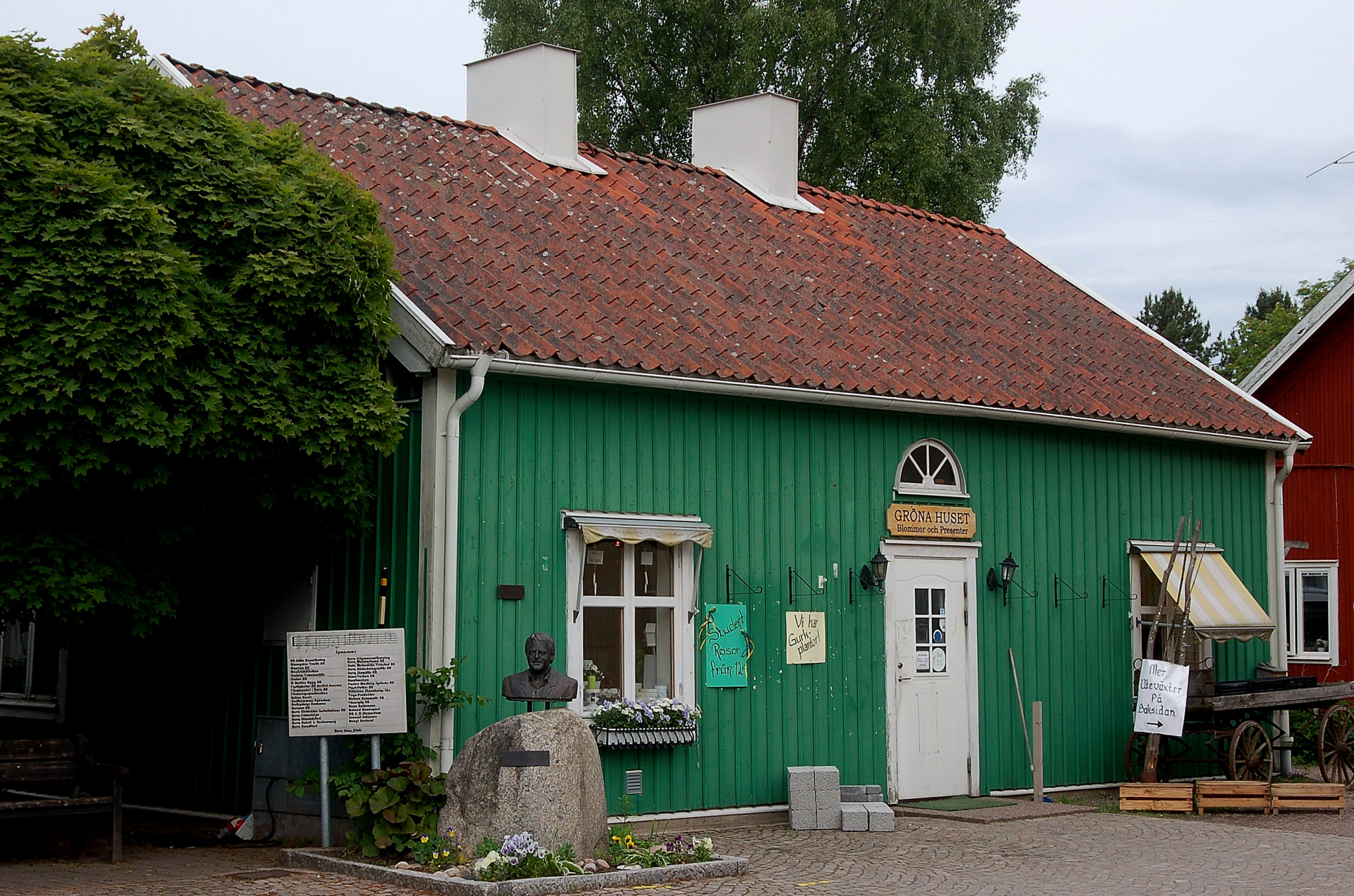 Eget foto av Gröna huset i Hova som var Stikkan Andersons barndomshem. Self-made.